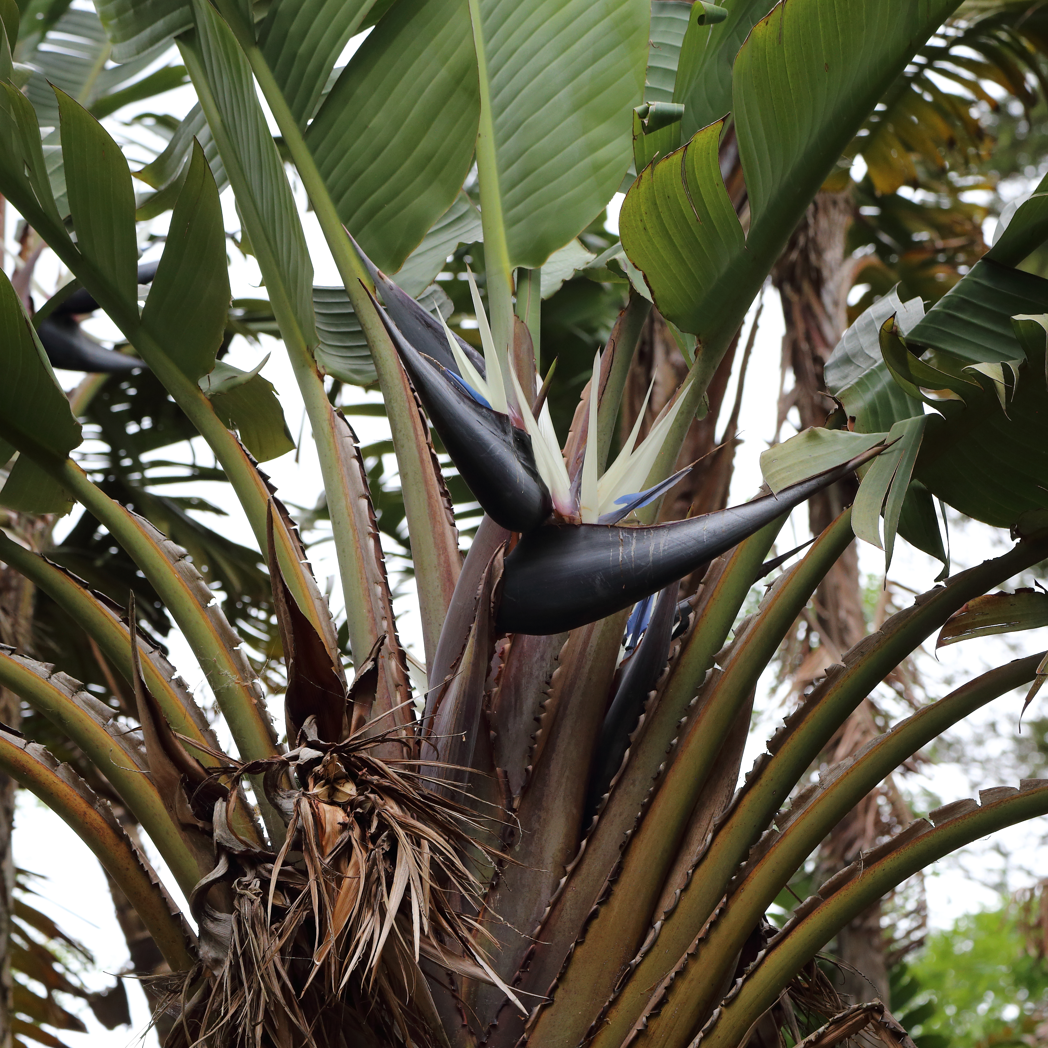 Strelitzia nicolai i parken Terra Nostra, Furnas, Azorerna.